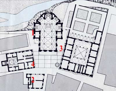 grondplan van piazza Pio II te Pienza